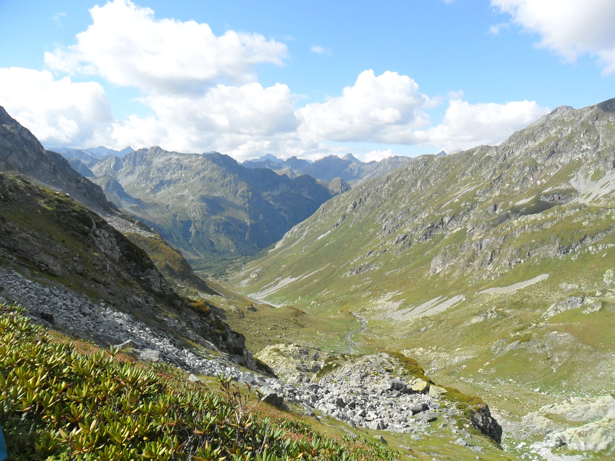 Верховья реки Дамхурц, вид с безымянного перевала из долины реки Макера